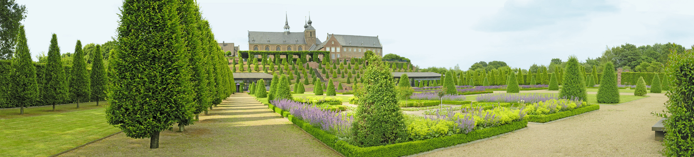 Kloster Kamp, Kamp-Lintfort